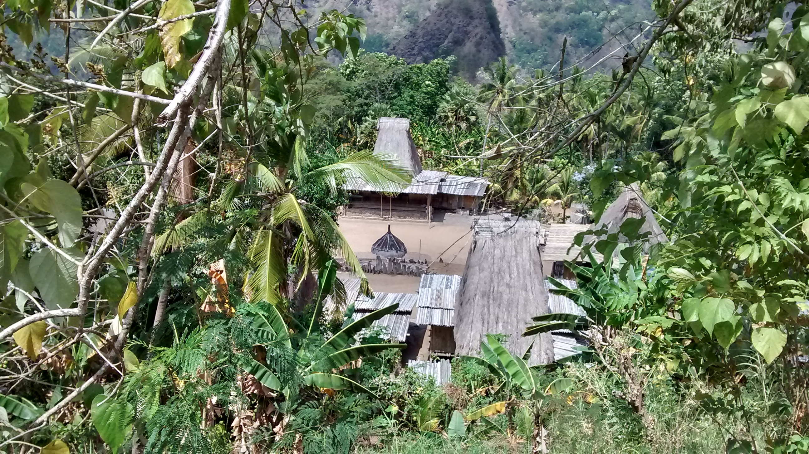 Watumanu, Jerebuu, Ngada Regency, East Nusa Tenggara, Indonesia